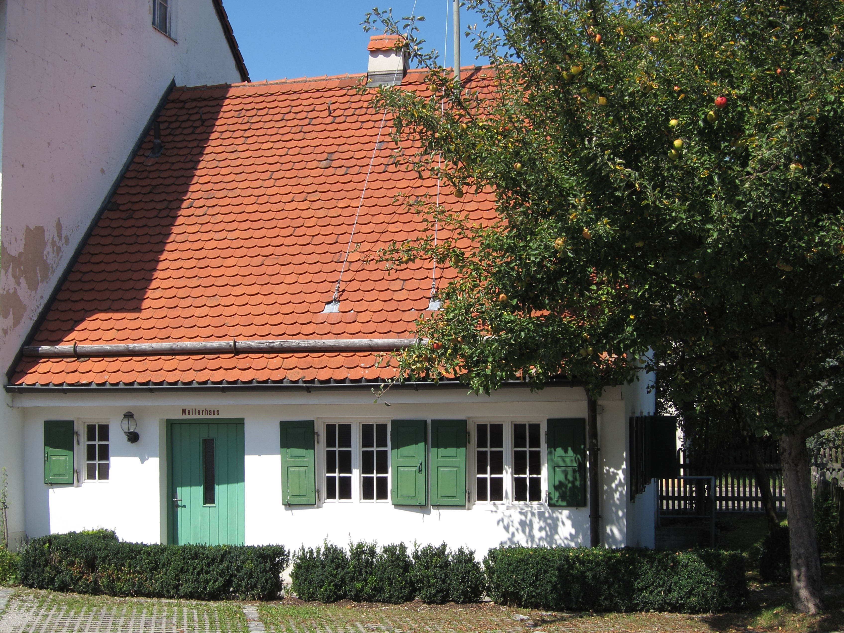 Hauptstraße 7, Wohnteil eines Bauernhauses (Seitenansicht)